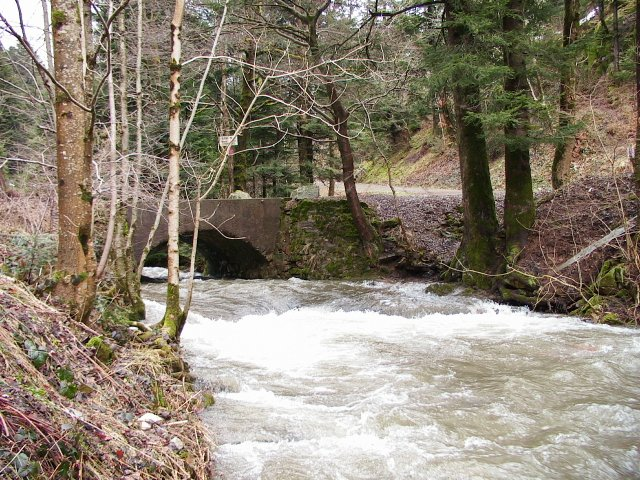 Rivière La Rosemontoise (Territoire de Belfort) Au pied du Château du Rosemont - crue moyenne Photo prise le 25 mars 2006 par F5ZV